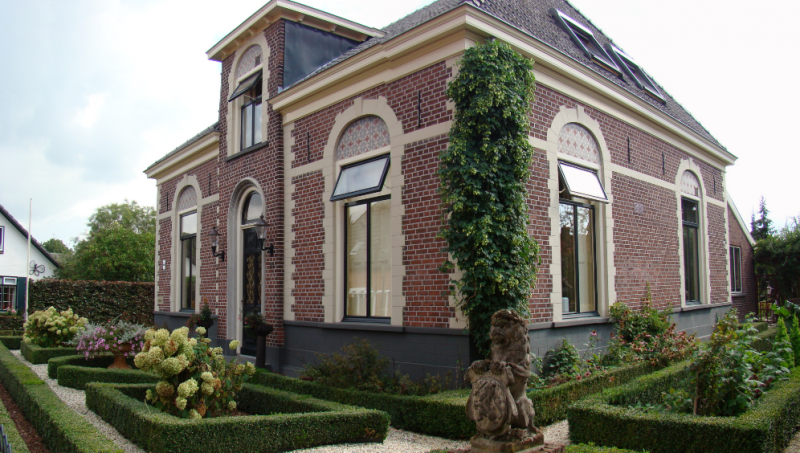 Gemeentelijk monument in Bredevoort (Netherlands)